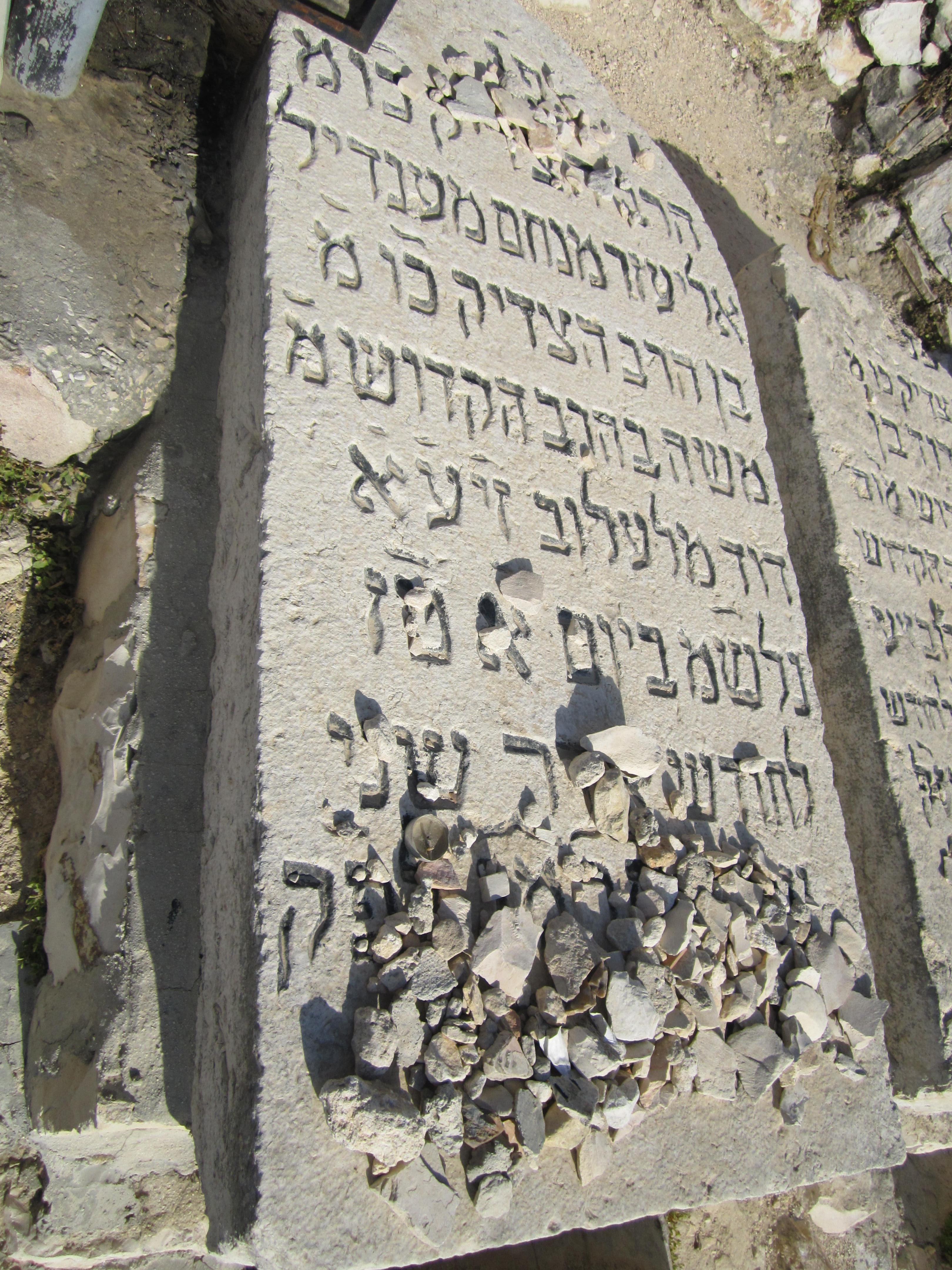 קברו של רבי אלעזר מנחם מנדל מלעלוב בהר הזיתים